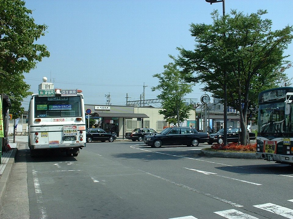 近鉄鈴鹿線平田町駅 三交バスが行き交う駅前